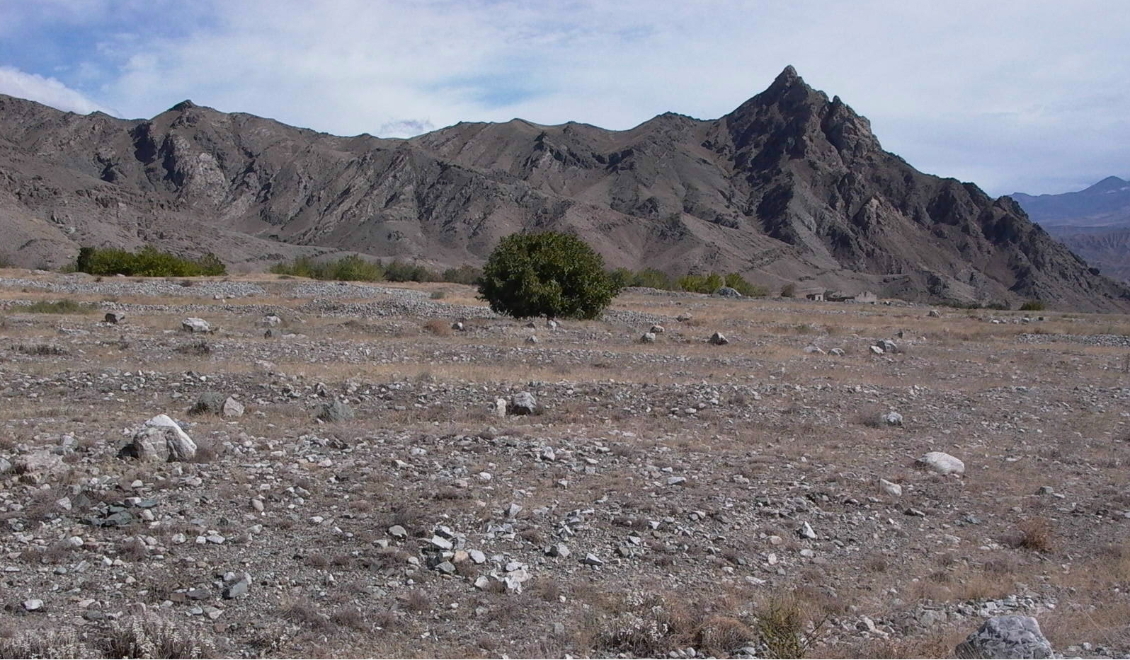 Nakhichevan Autonomous Republic, Azerbaijan